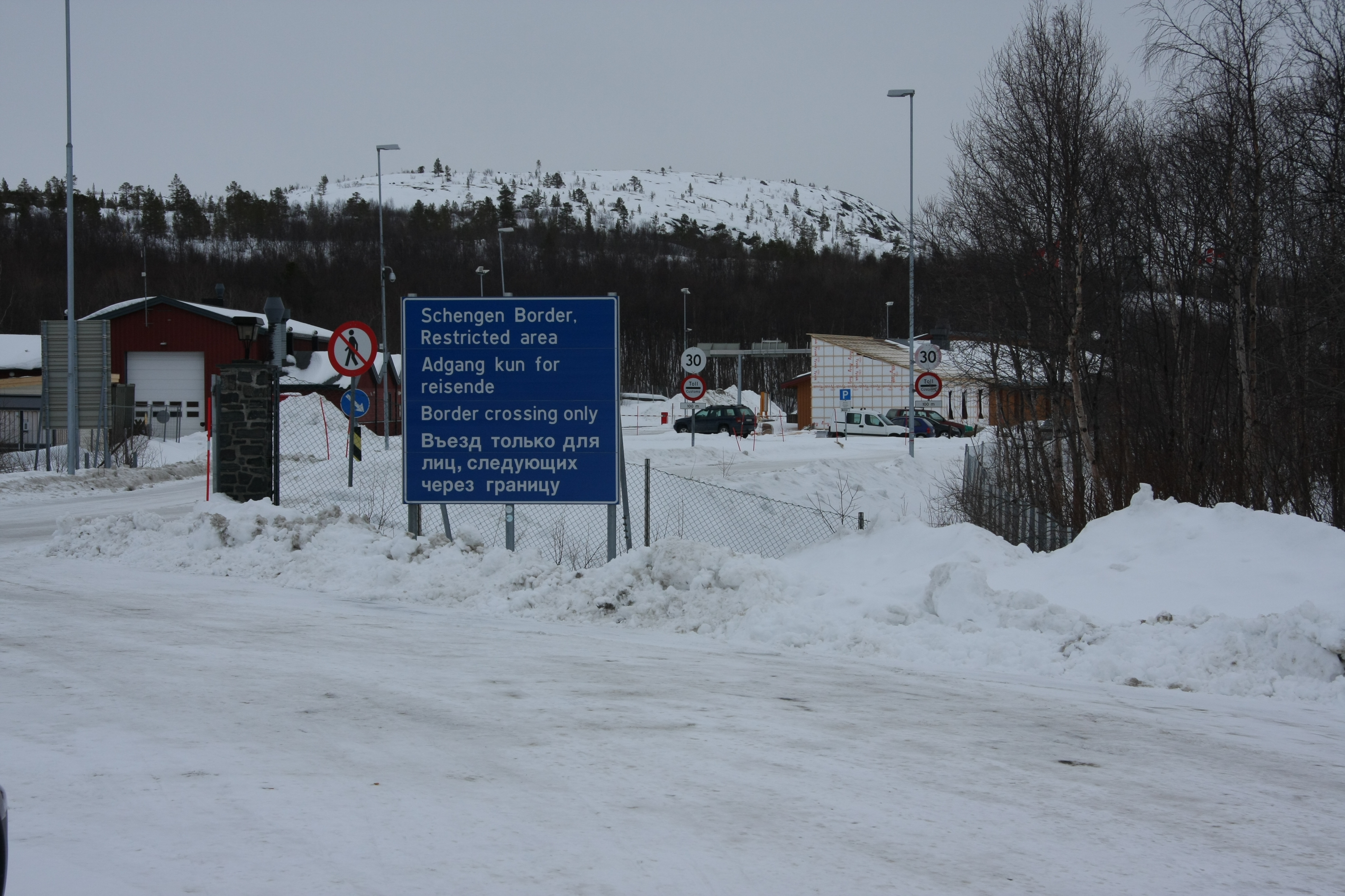 Der 13km von Kirkenes entfernte Grenzübergang von Norwegen zu Russland.